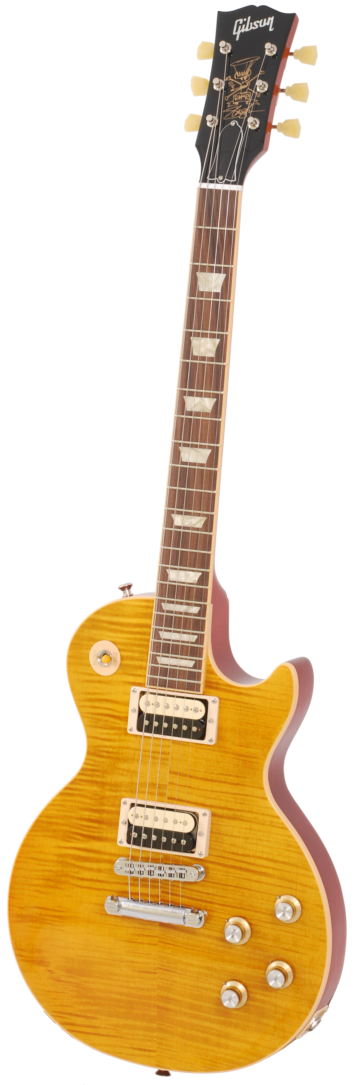 Gitara elektryczna Les Paul Slash "Apetite For Destruction" firmy Gibson